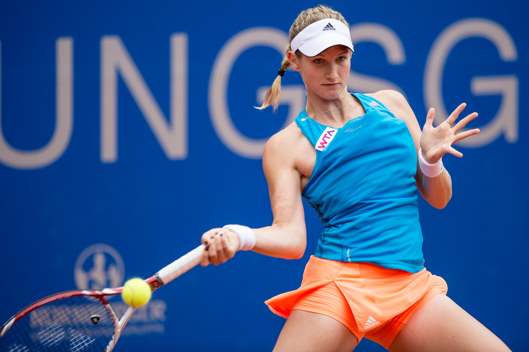 Damentennis,Lisa-Maria Moser,Nürnberger Versicherungscup 2014,Tennis,WTA